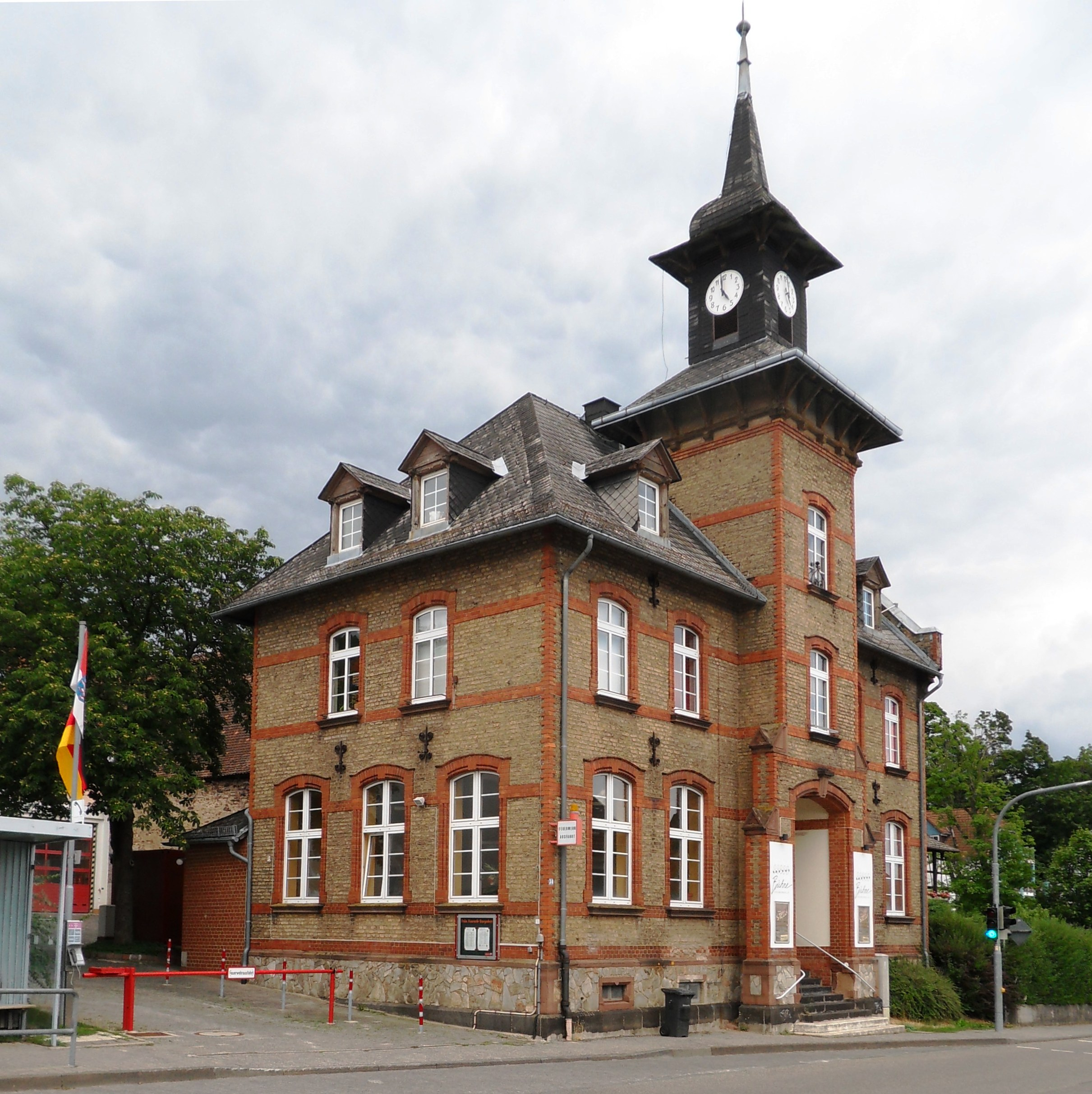 Blick von Westen auf die ehemalige Schule Mainstraße 34 in Georgenborn. Der denkmalgeschützte Backsteinbau mit einem kleinen Uhrturm in der Mittelachse wurde um 1900 in zentraler Lage an der Ortsdurchfahrt errichtet. Das für die kleine Gemeinde relativ aufwändige Schulhaus geht auf eine Stiftung des Barons Ferdinand von Krauskopf zurück